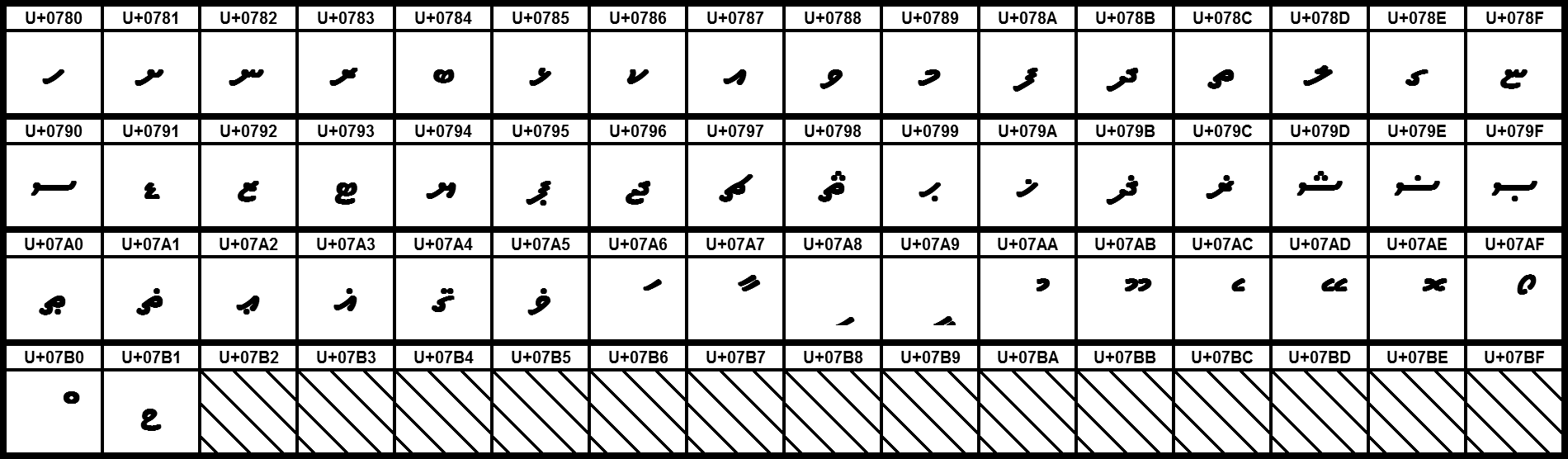 Grafiktafel für den Unicodeblock Thaana. Schraffierte Felder sind unbesetzte Codepoints.